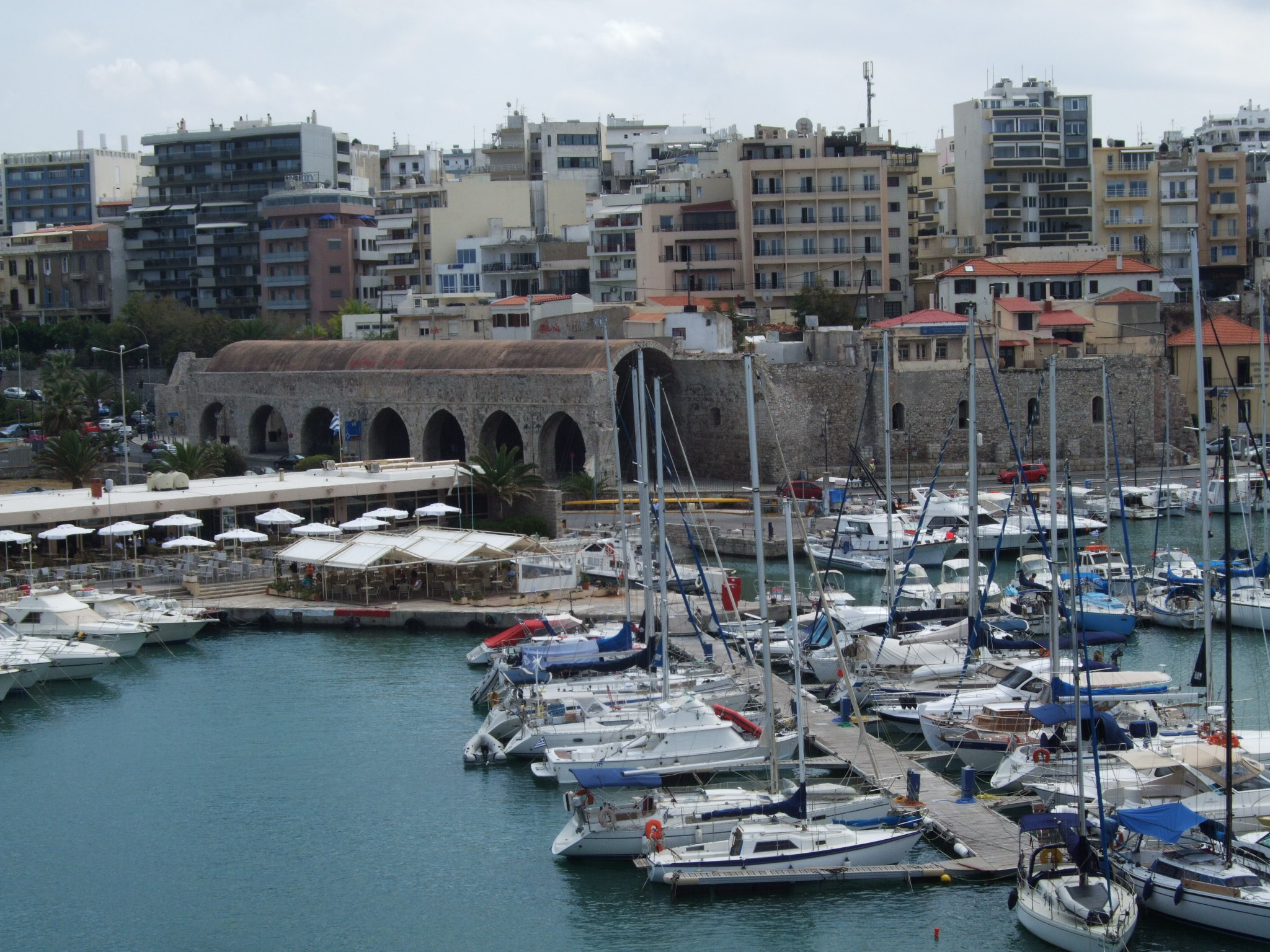 Arsenały weneckie w porcie. Heraklion.